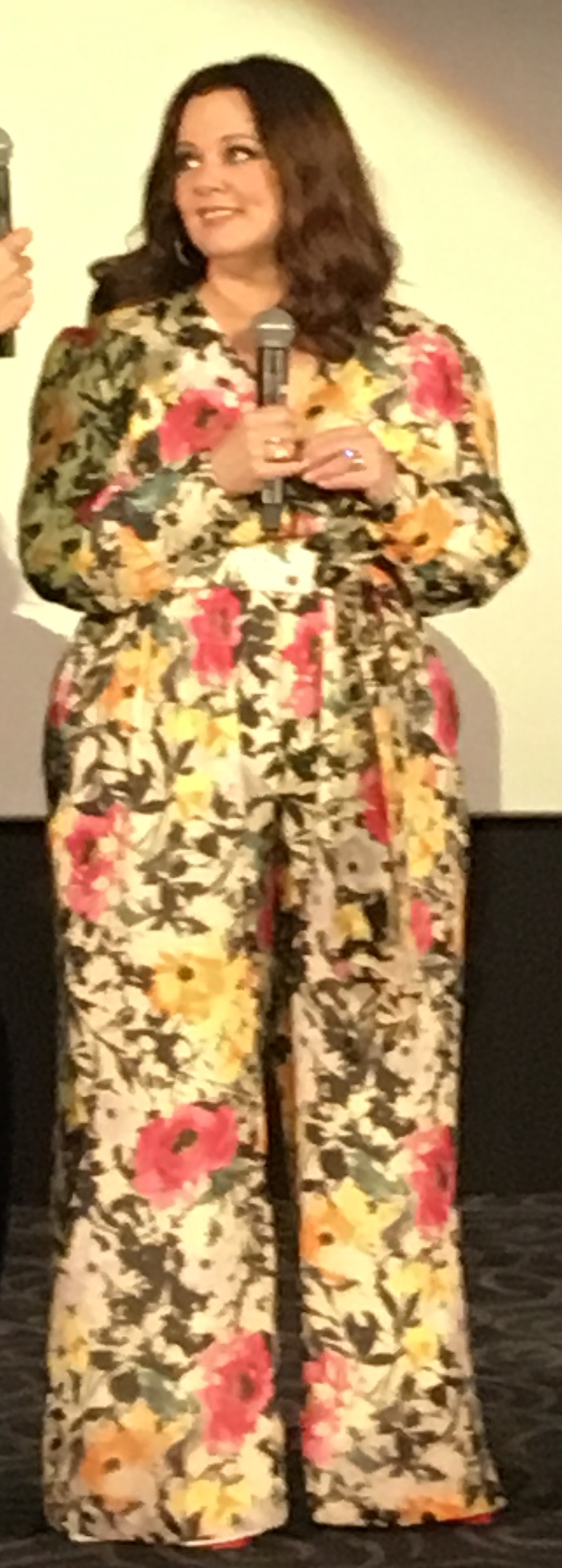 en 2016 at The boss presentation